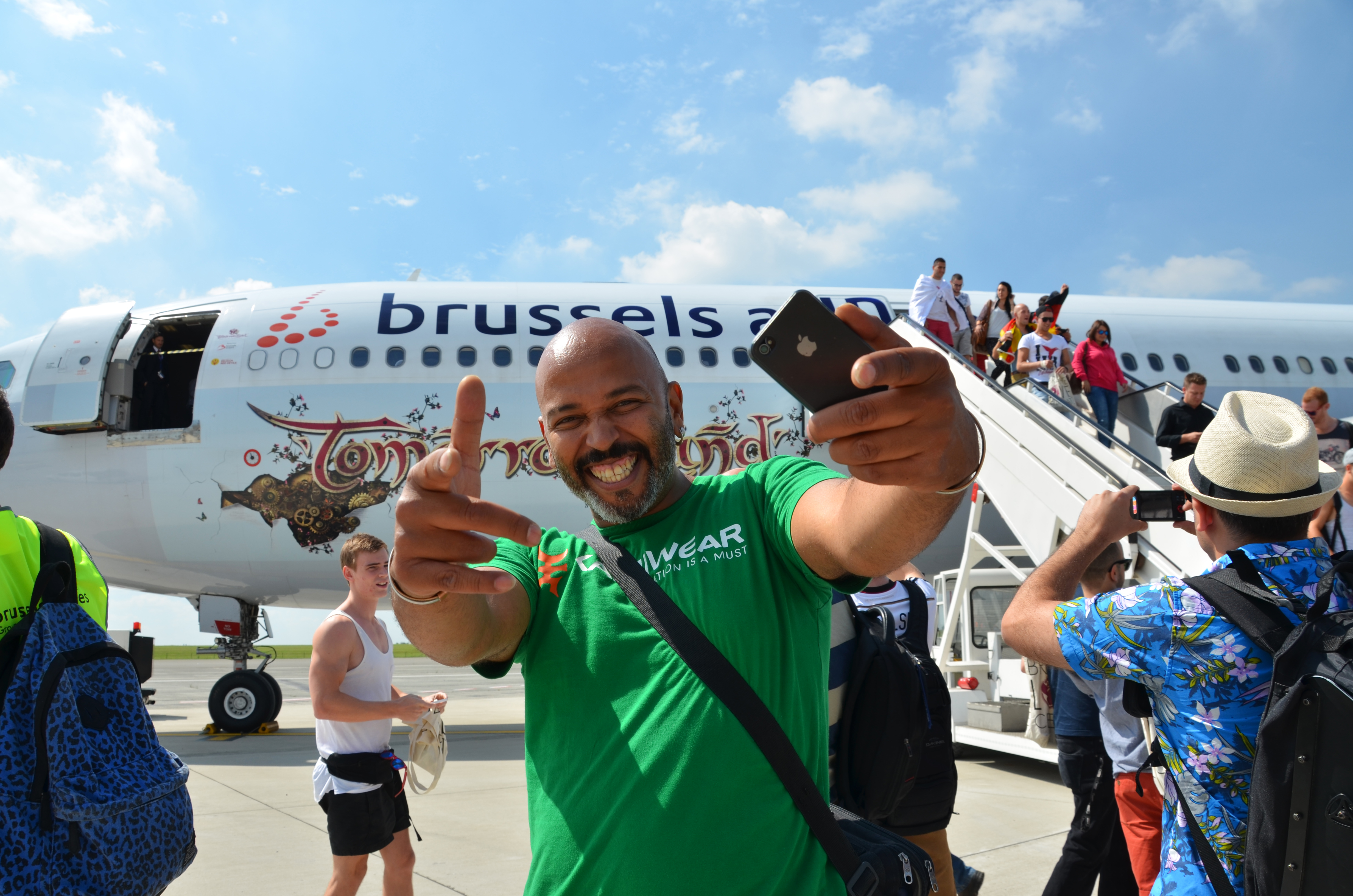 @Brusselsairport